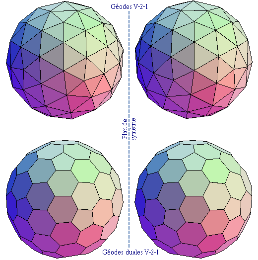 Géodes V-2-1, normales et duales, avec leurs 2 formes énantiomorphes